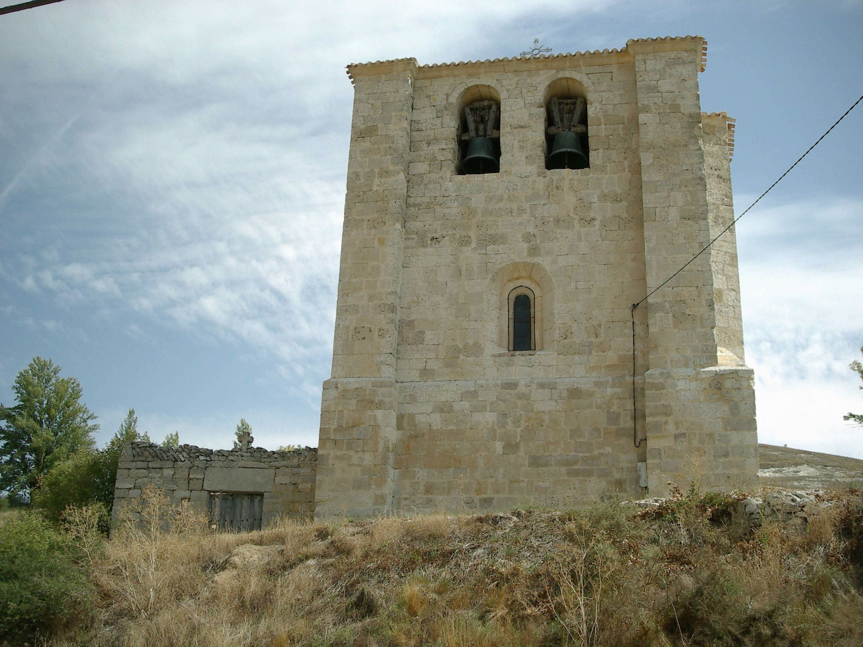 Iglesia romanica de San Pedro ; Miñón de Santibáñez